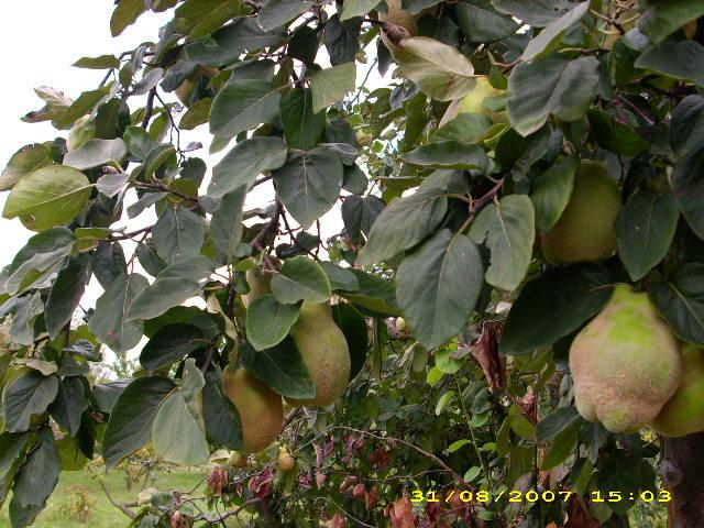 Birsalmafa (Cydonia oblonga) termésekkel.